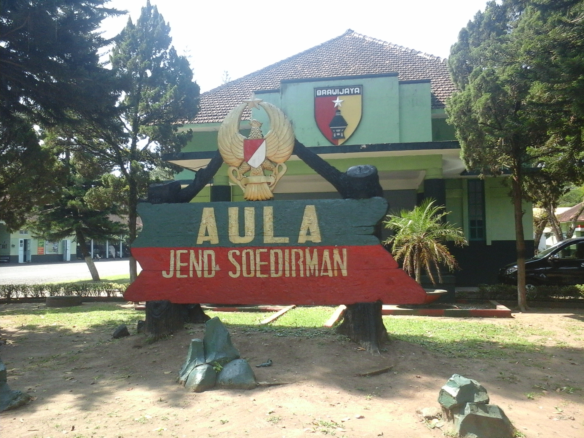 Aula Jenderal Soedirman yang berada di kompleks Sekolah Calon Bintara (Secaba) Rindam V Brawijaya di Jember, Jawa Timur